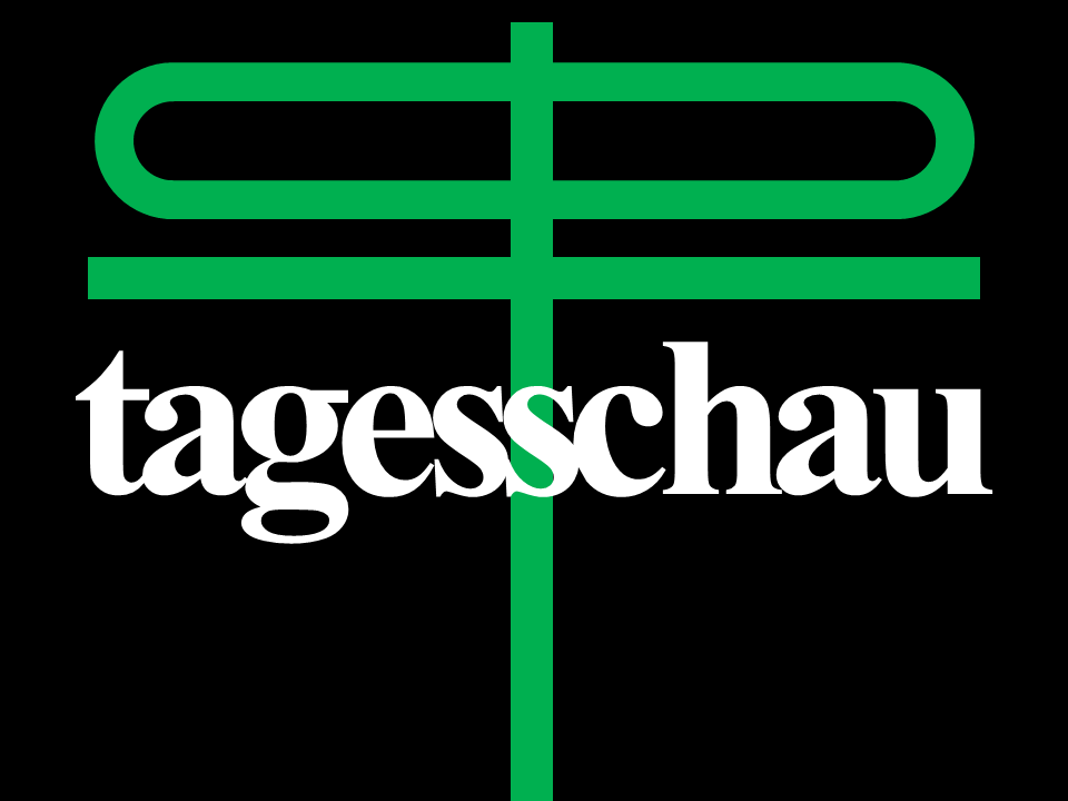 Veccho Logo Tagesschau Rai Sender Bozen